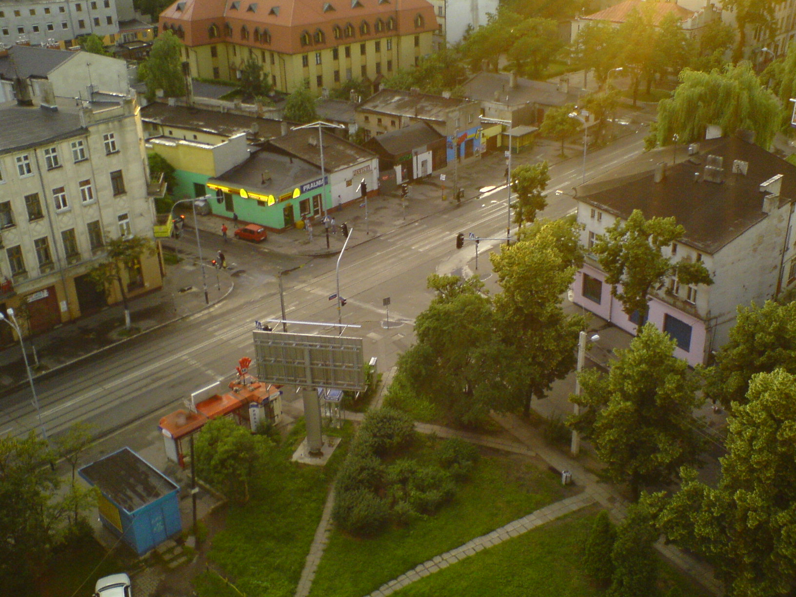 Skrzyżownie ulicy Rzgowskiej, Leczniczej i Piasecznej, widok z góry